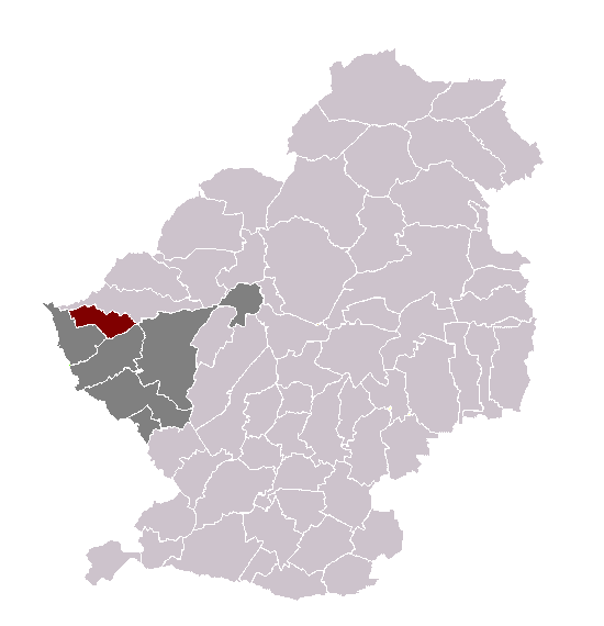 Lauwin-Planque dans son canton et son arrondissement